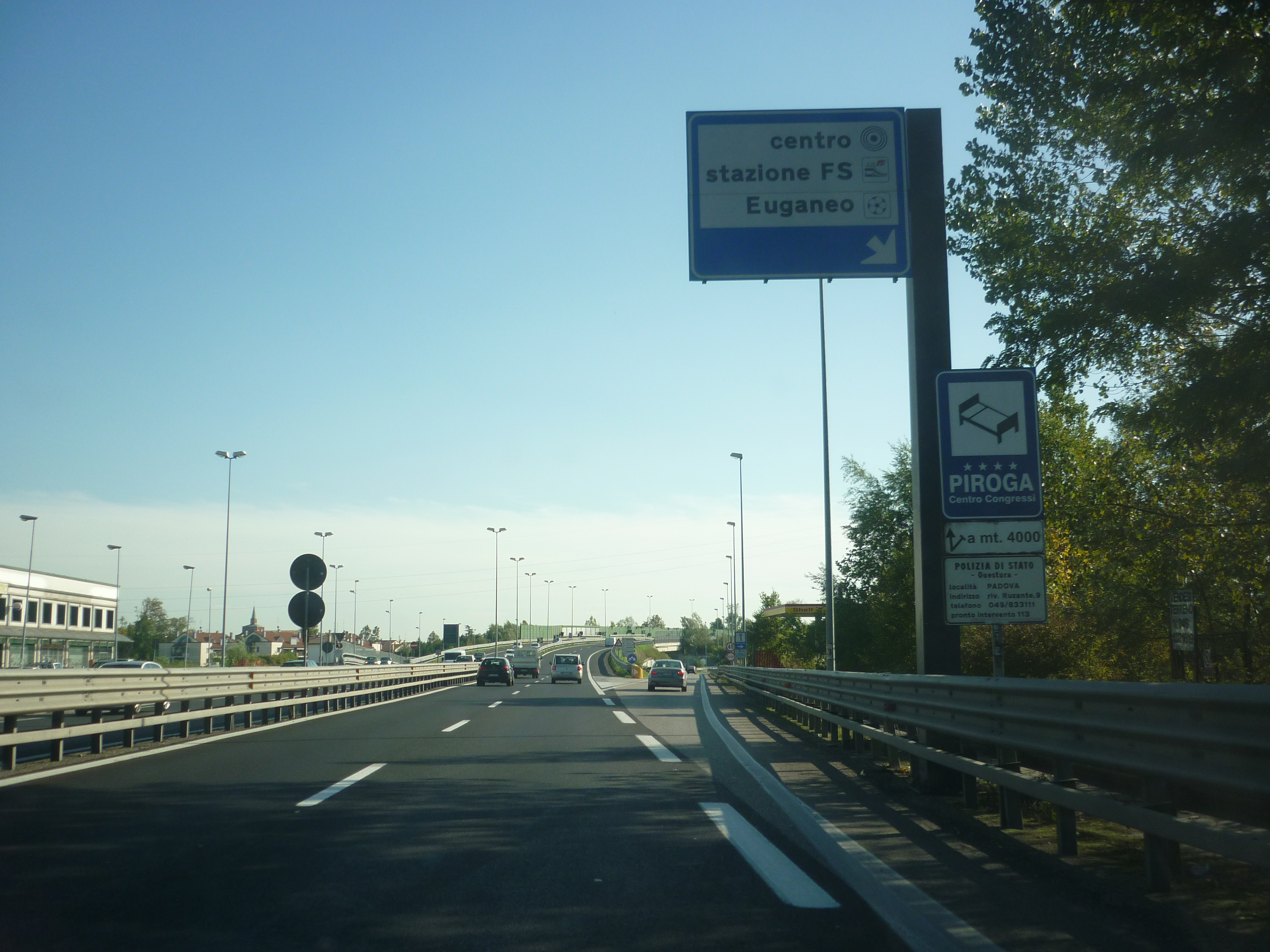 sr47